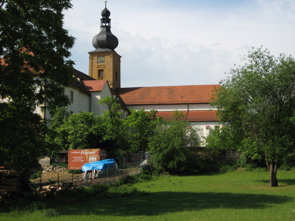 Ehemaliges Kloster in Weißenohe, vS, 2007-05-13.